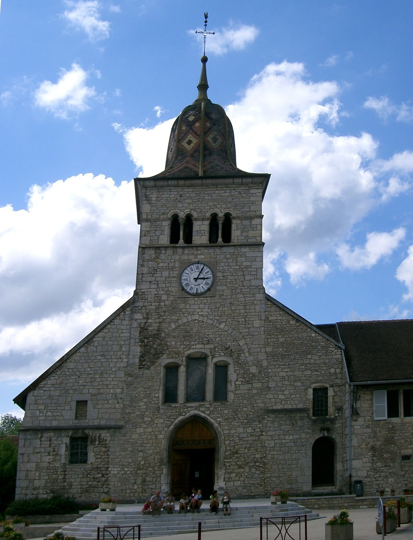 Clairvaux-les-Lacs - l'église